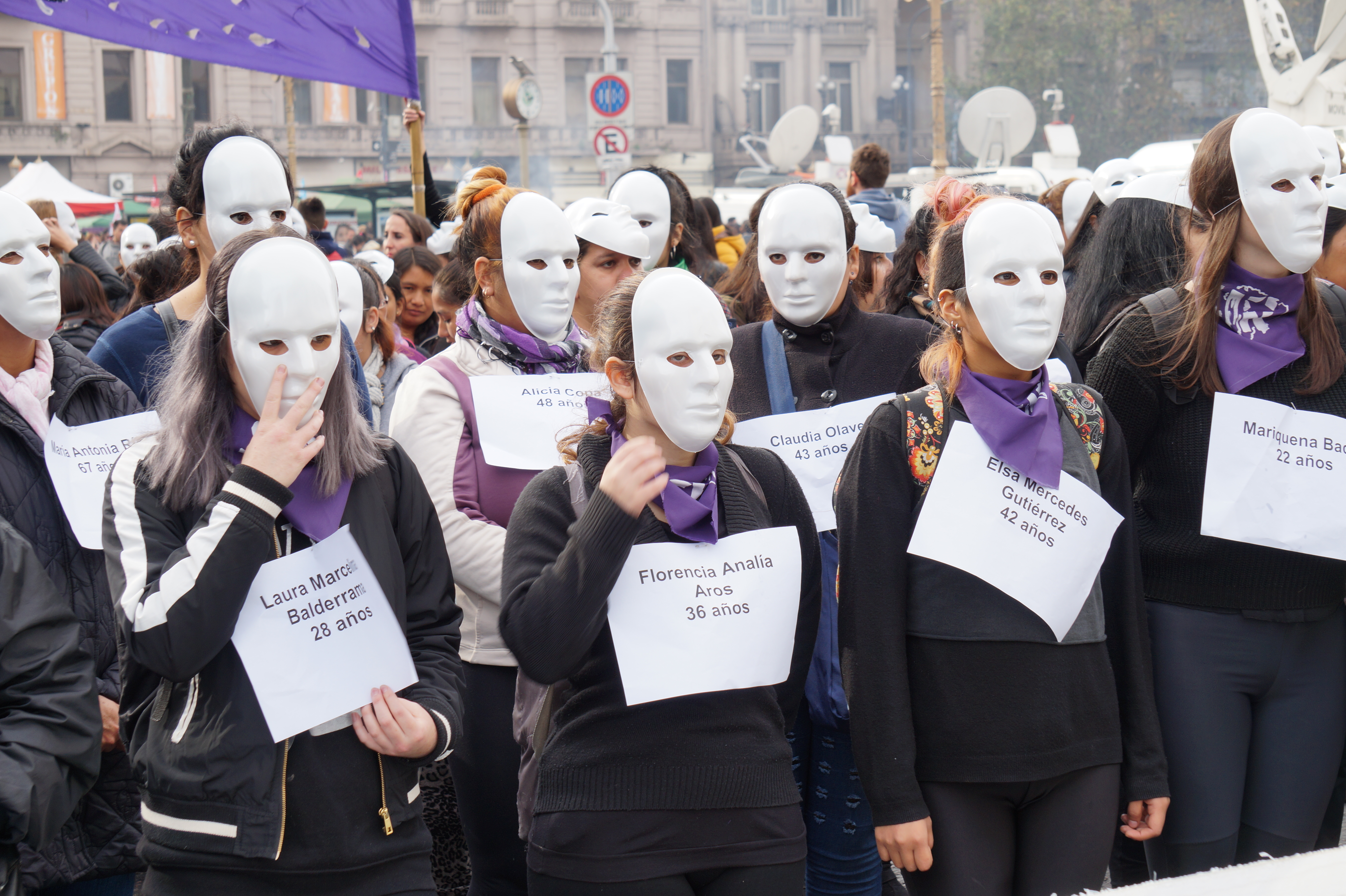 Ni una menos, Buenos Aires, Argentina